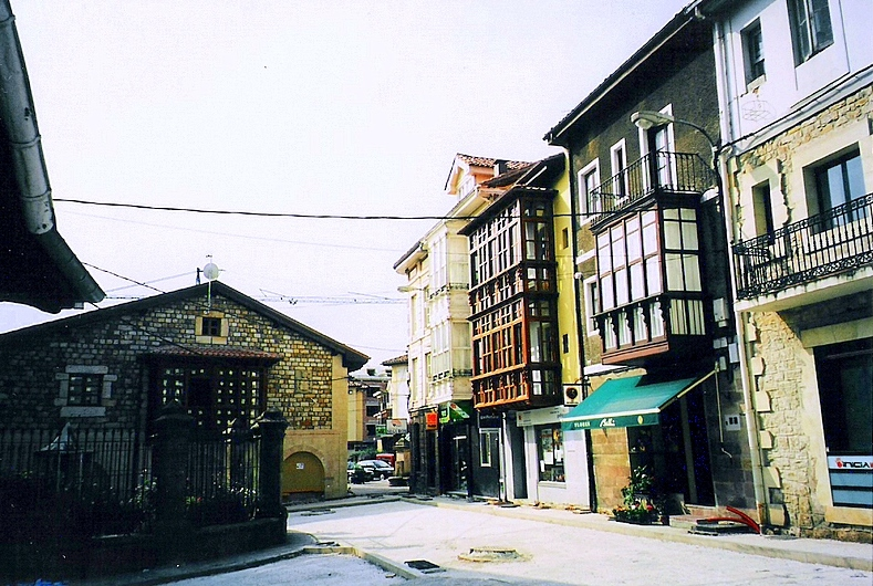 Cabezón de la Sal - Centre de la població.